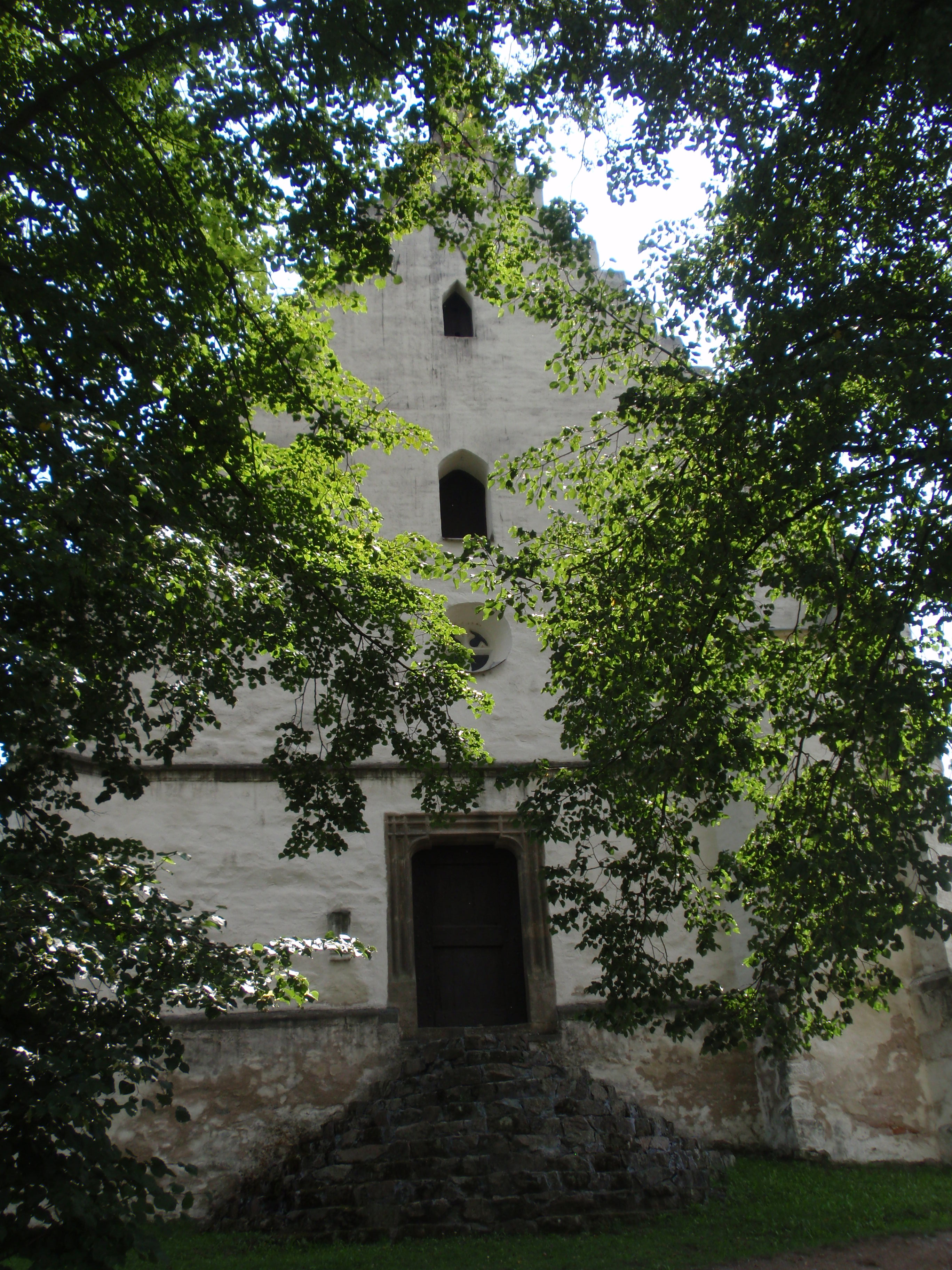 Kostel sv. Kateřiny (Svatá Kateřina), Svatá Kateřina